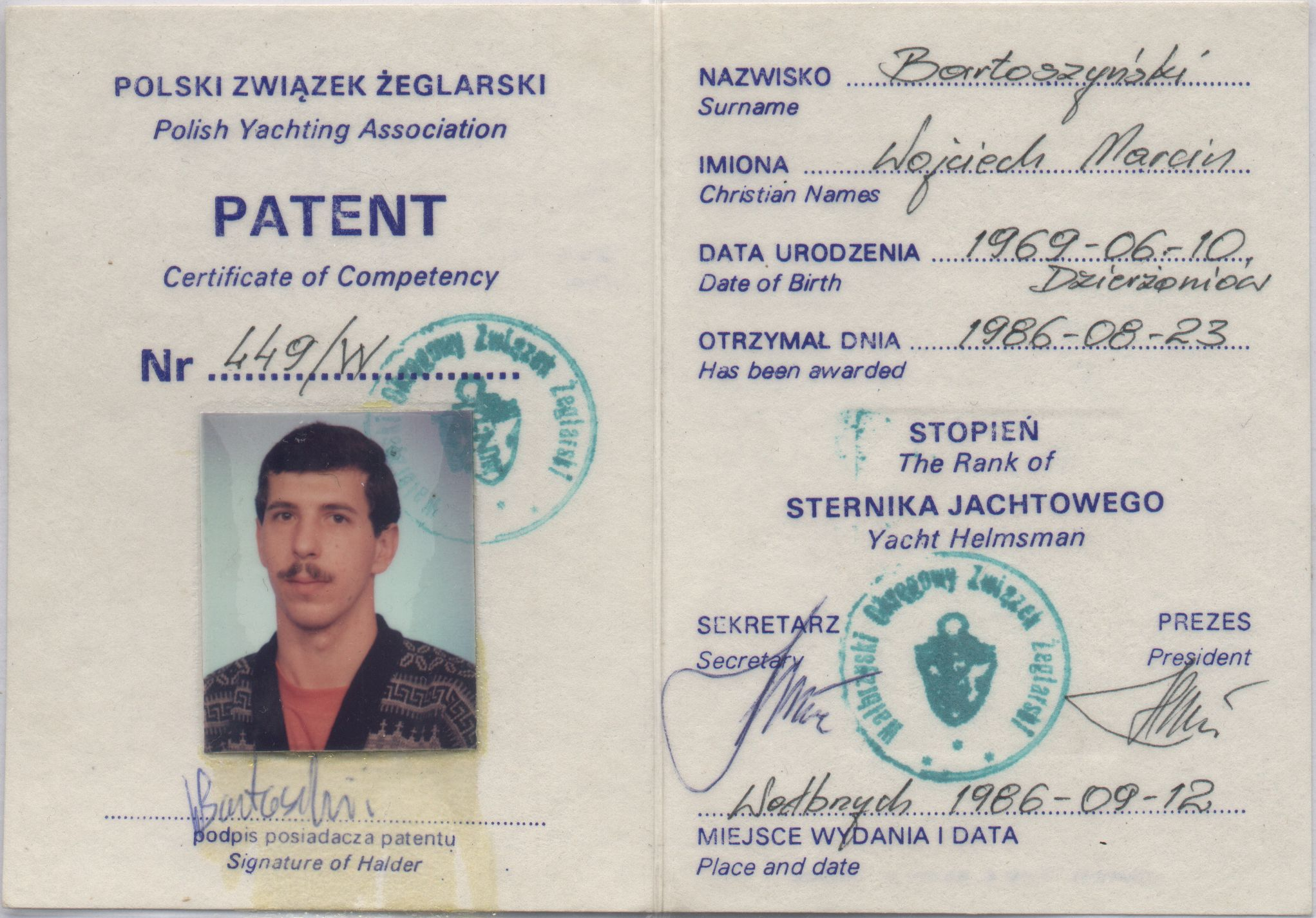 Patent sternika jachtowego z roku 1996 - awers/ Yacht Helmsman patent 1986